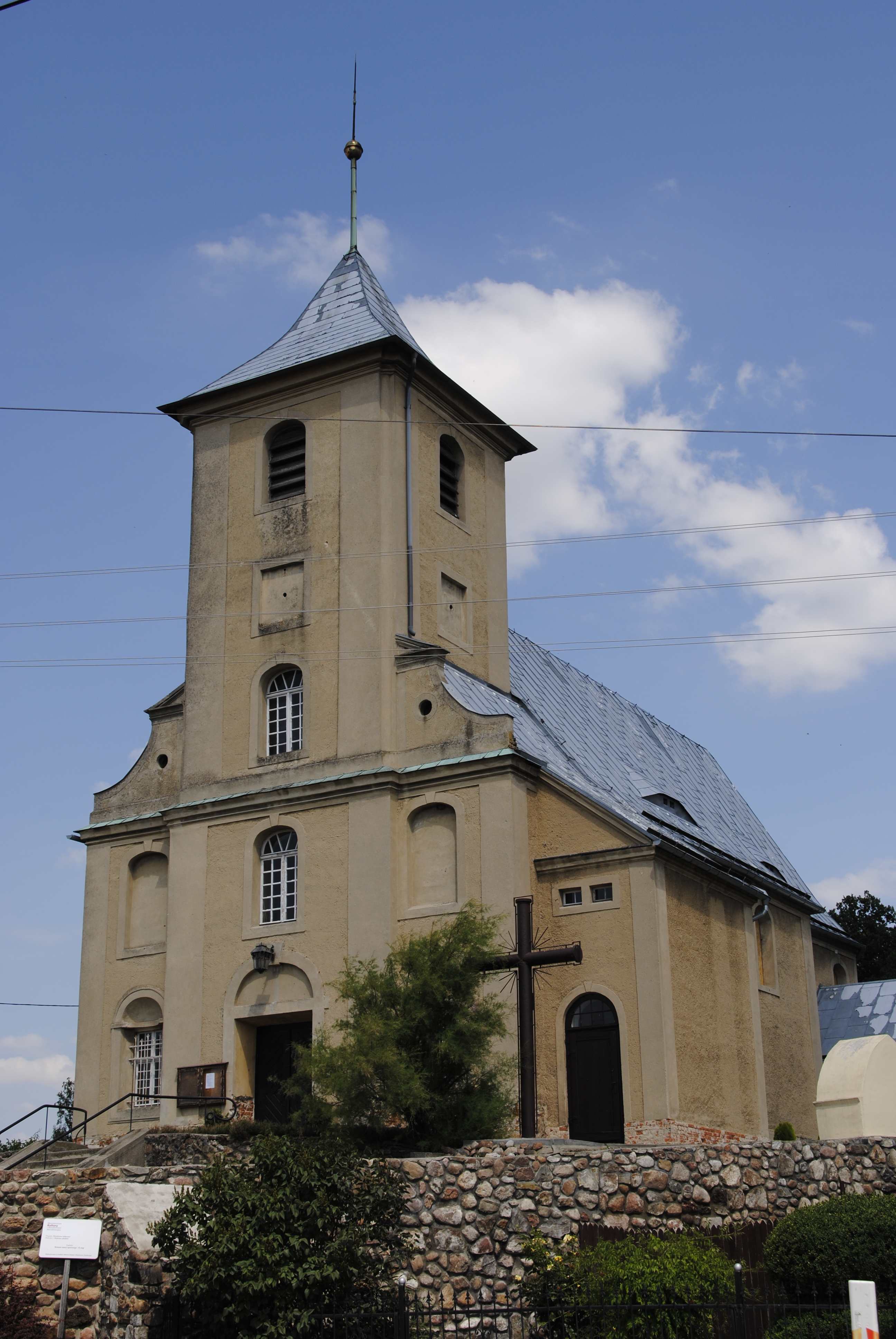 Kirche St. Simon und Judas Thaddäus in Jędrzejów Gmina Grodków (dt. Endersdorf, Grottkau)